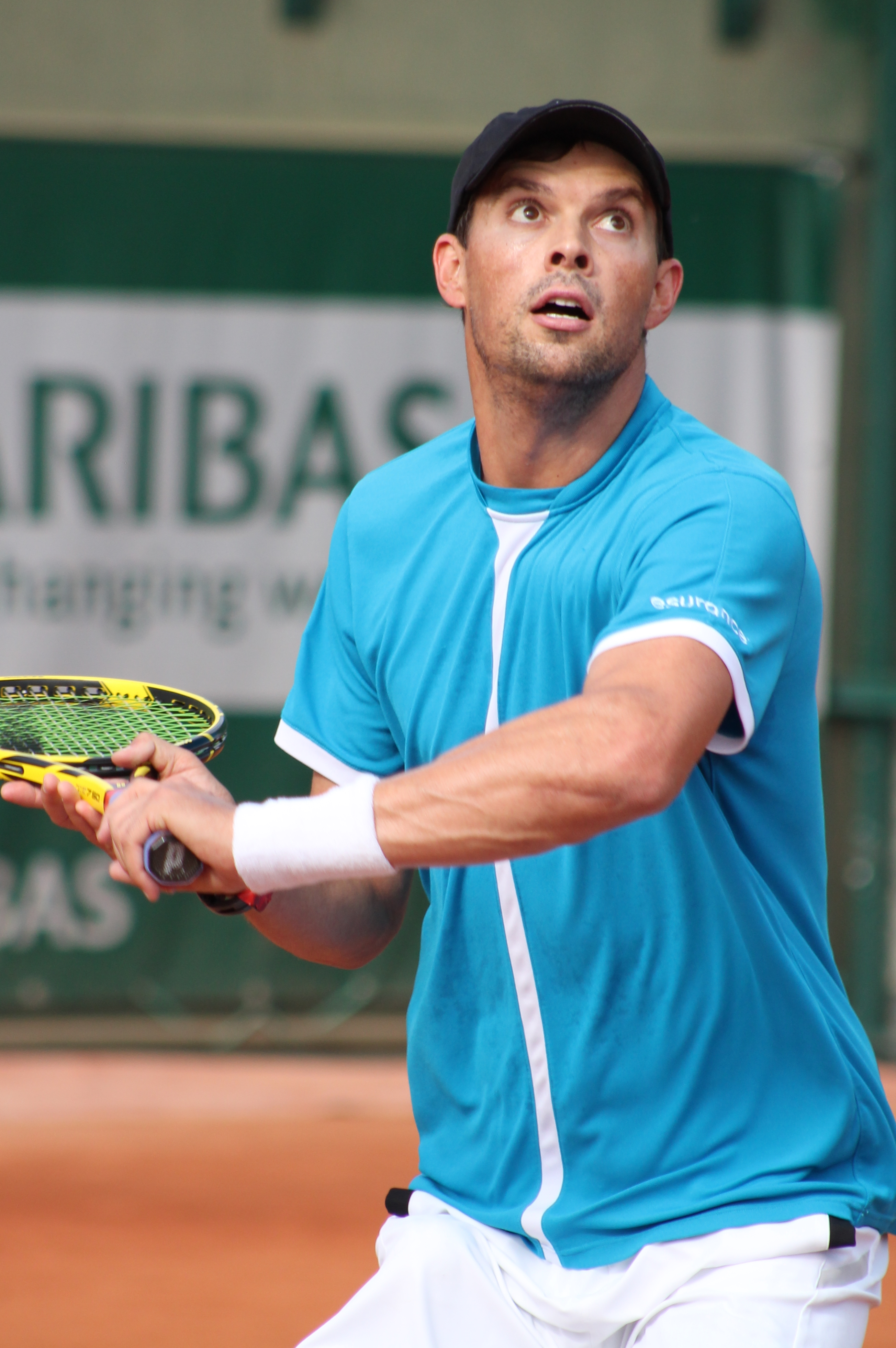 Bryan B. RG15 (1)